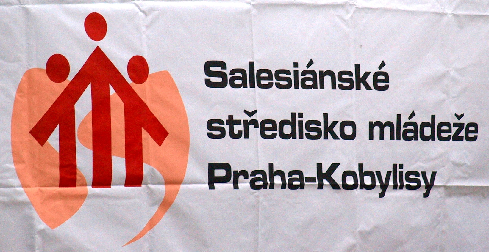 Salesiánské středisko Praha